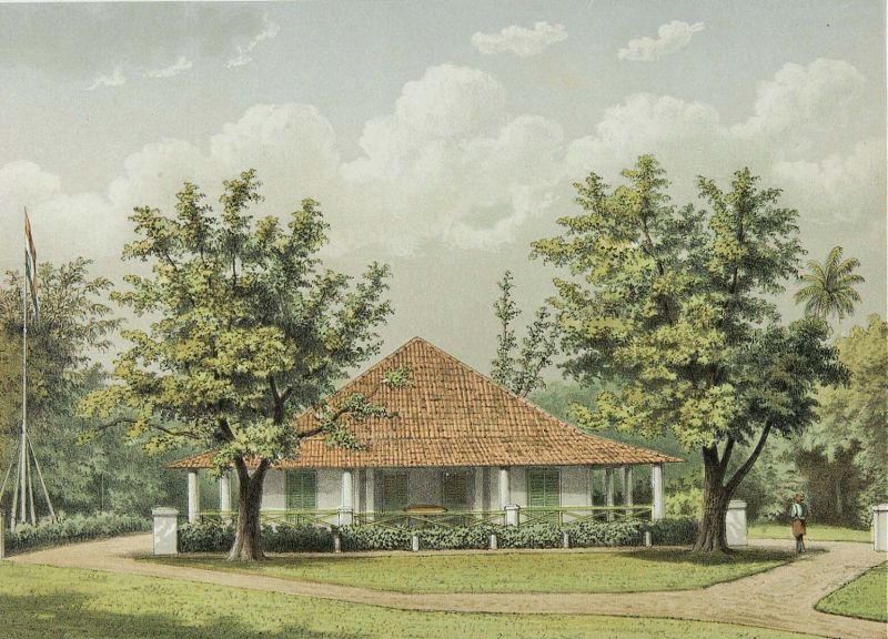 Litho. Litho naar een oorspronkelijke aquarel van J. Rappard.. De woning van de assistent-resident in Sumedang